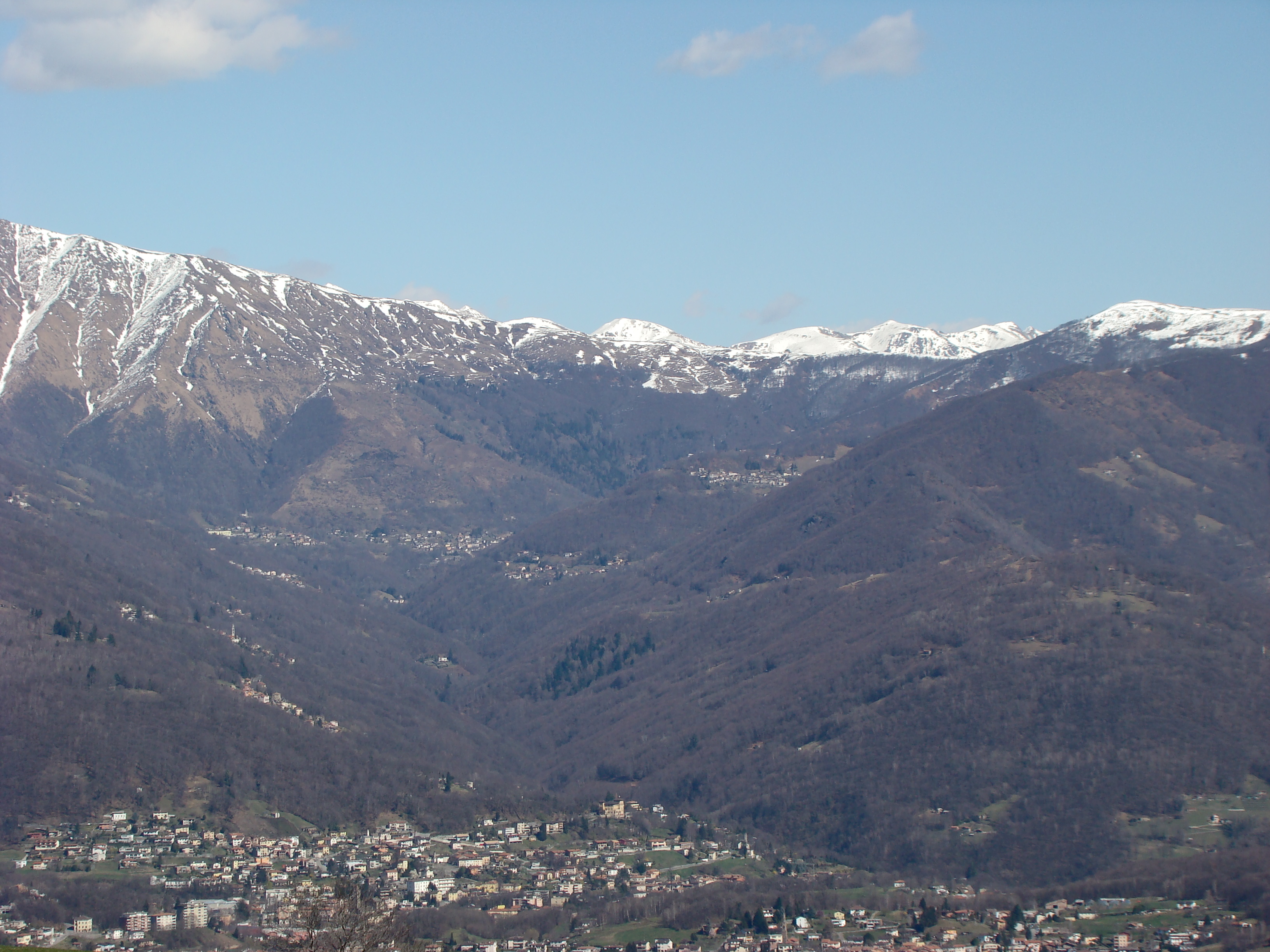 Val Colla Canton Ticino